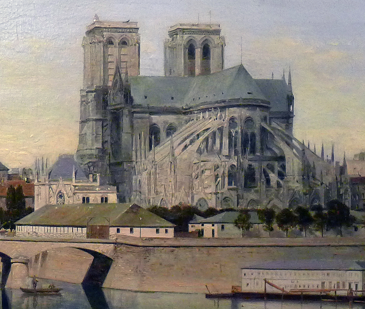 Cette vue illustre une étape intermédiaire dans la grande campagne de restauration de la cathédrale menée par les architectes Lassus et Violet-le-Duc. On aperçoit en effet la nouvelle sacristie (bâtiment à gauche de la cathédrale), achevée en 1850, mais pas encore la haute flèche qui allait être rétablie peu après à la croisée du transept.